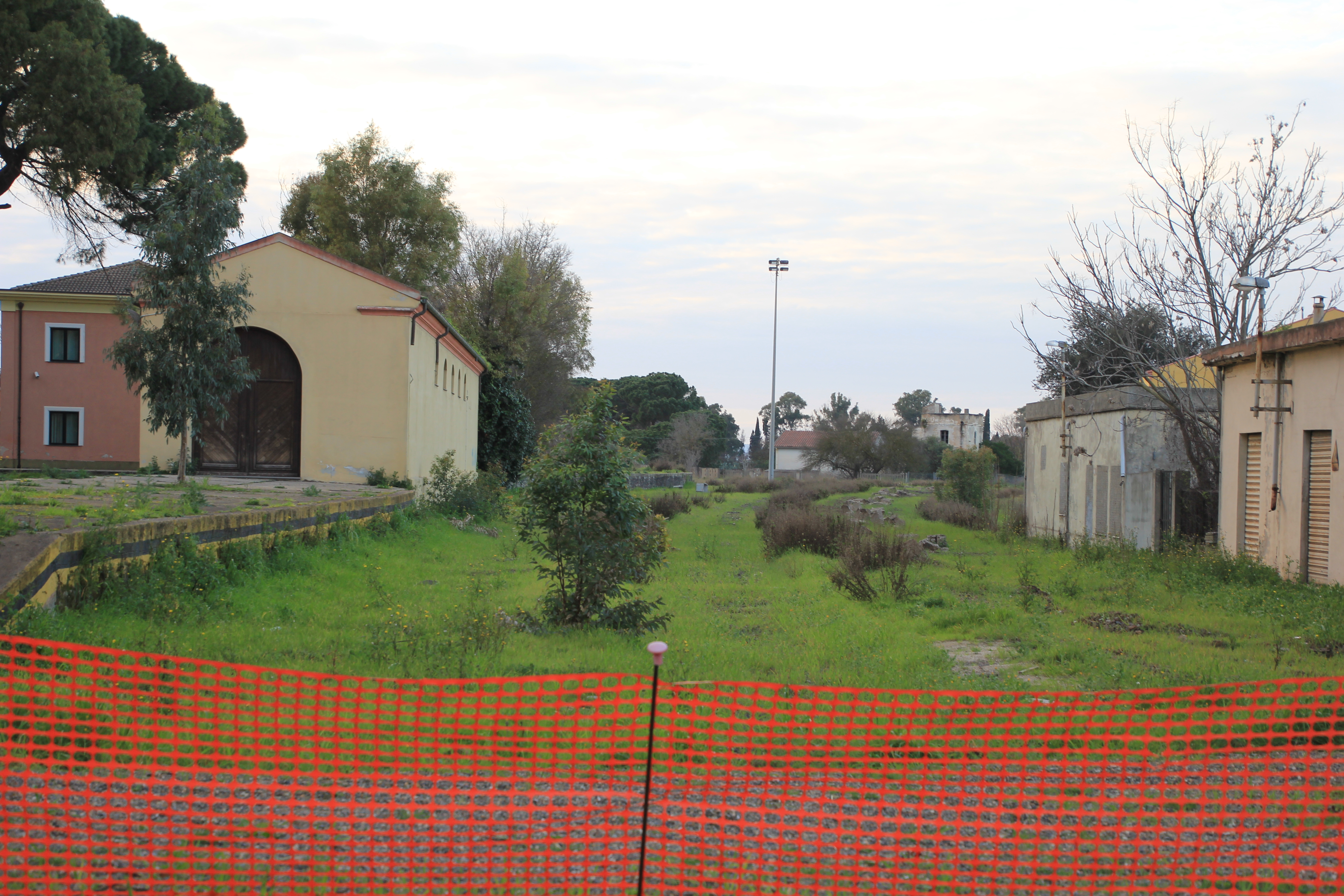 San Gavino Monreale - Stazione ferroviaria del 1871